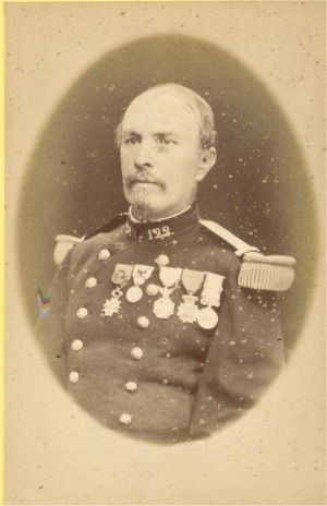 Lieutenant-colonel Madelor, 122e régiment d'infanterie